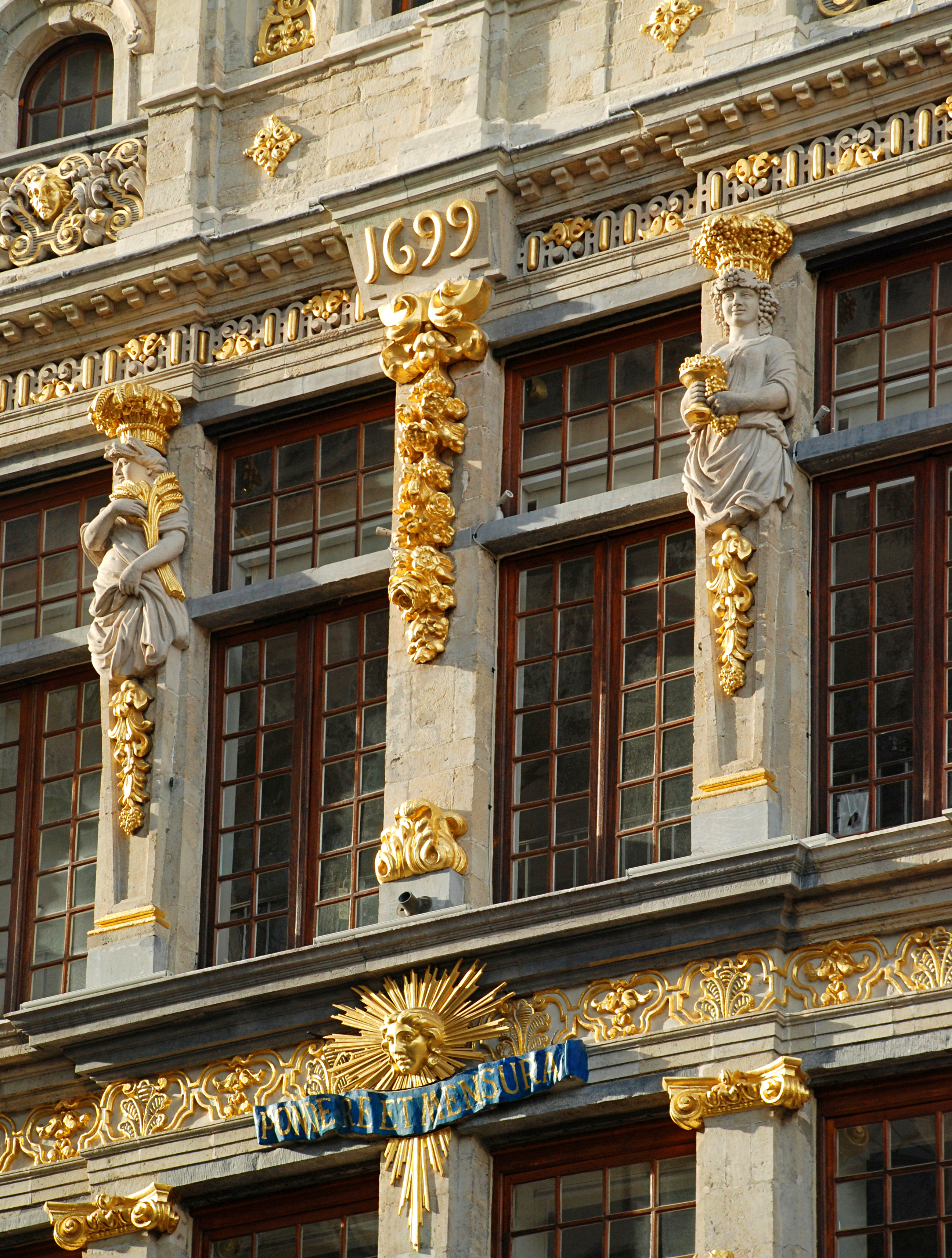 Belgique - Bruxelles - Grand-Place - Maison du Renard - Cariatides et millésime 1699